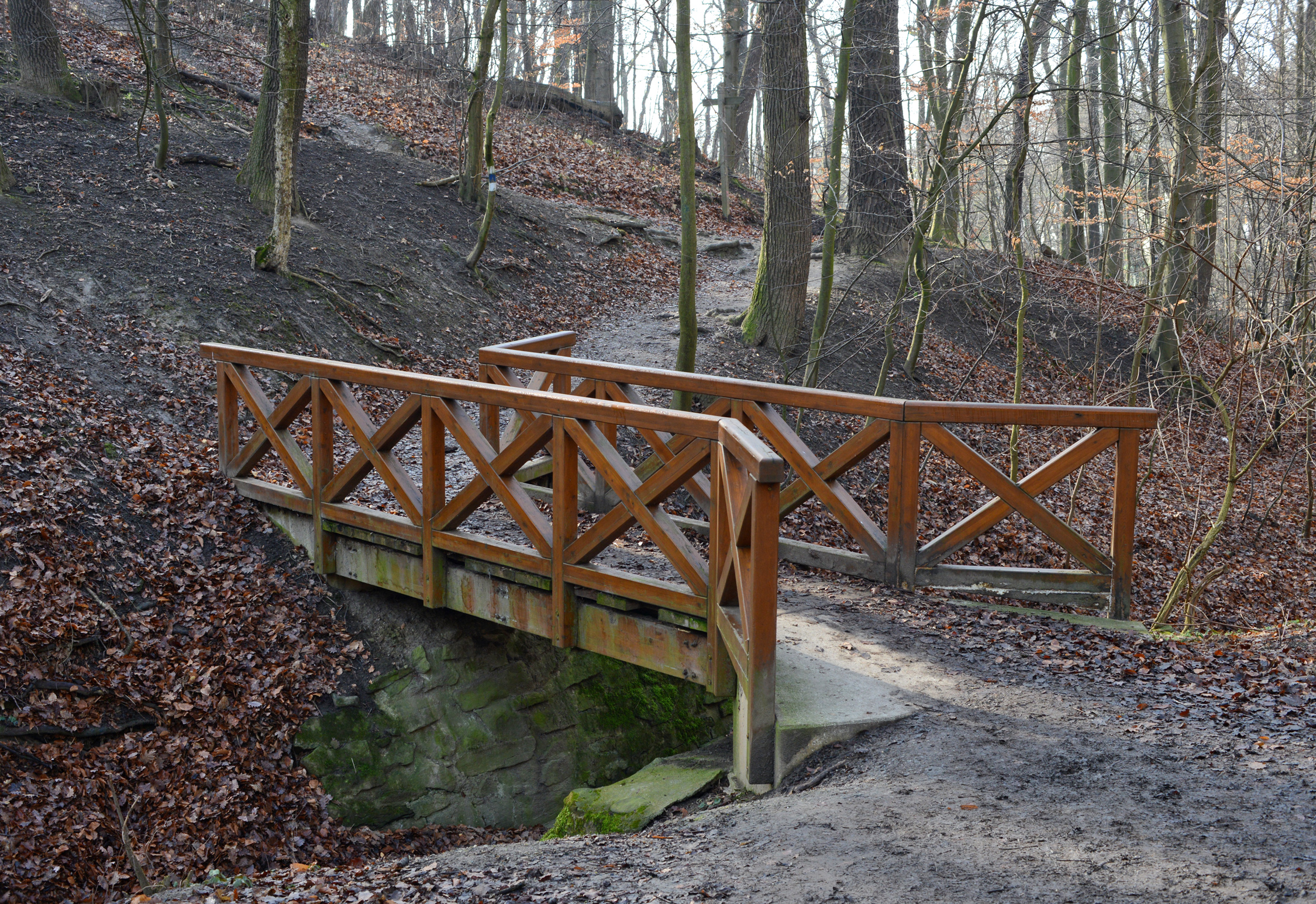 Oberer Dehneparksteg beim Dehnepark